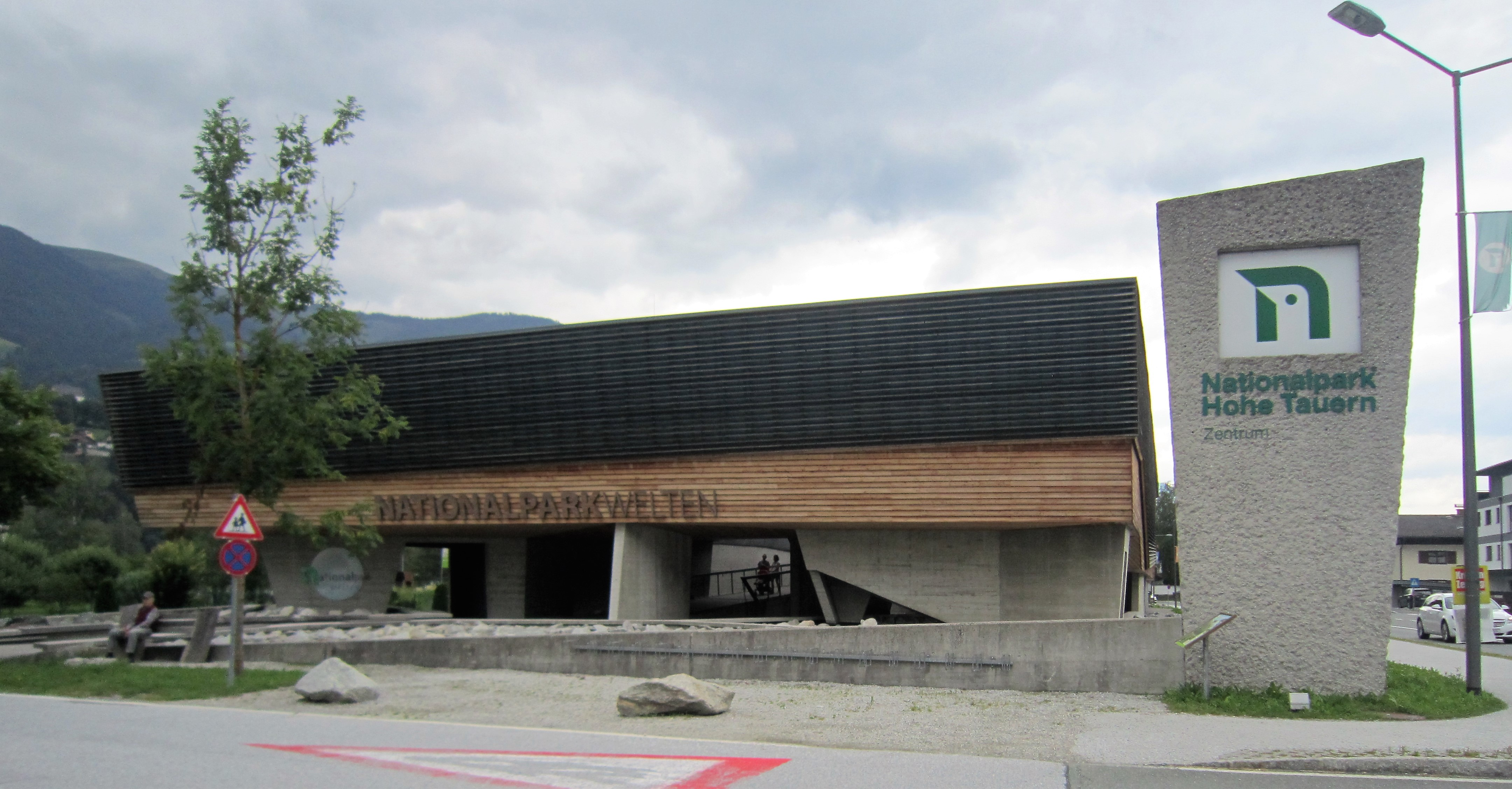 Informationszentrum "Nationalparkwelten" im Nationalpark Hohe Tauern in Mittersill